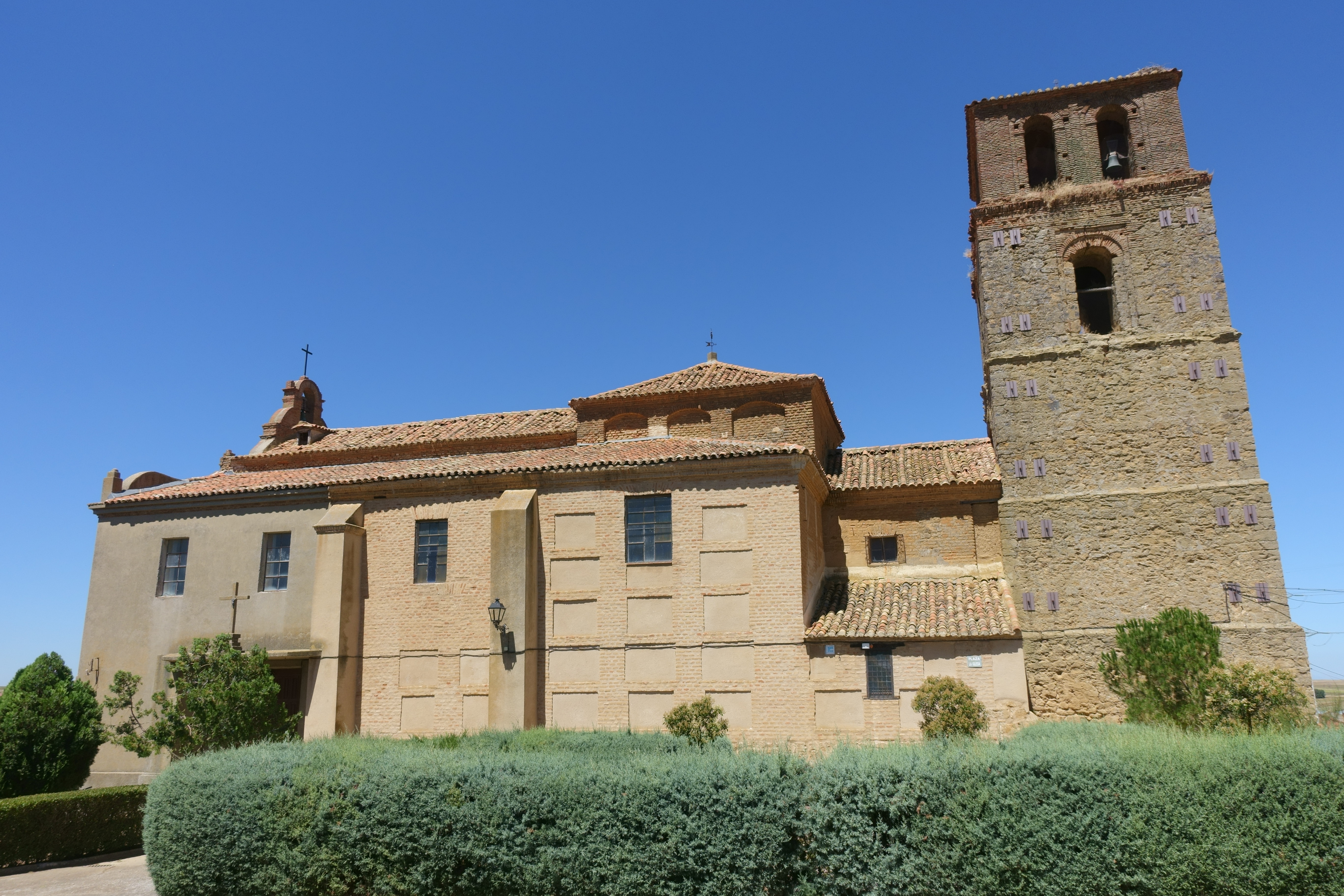 Iglesia del Salvador, Castroponce (Valladolid, España).